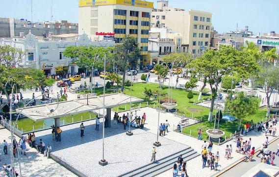 CHICLAYO